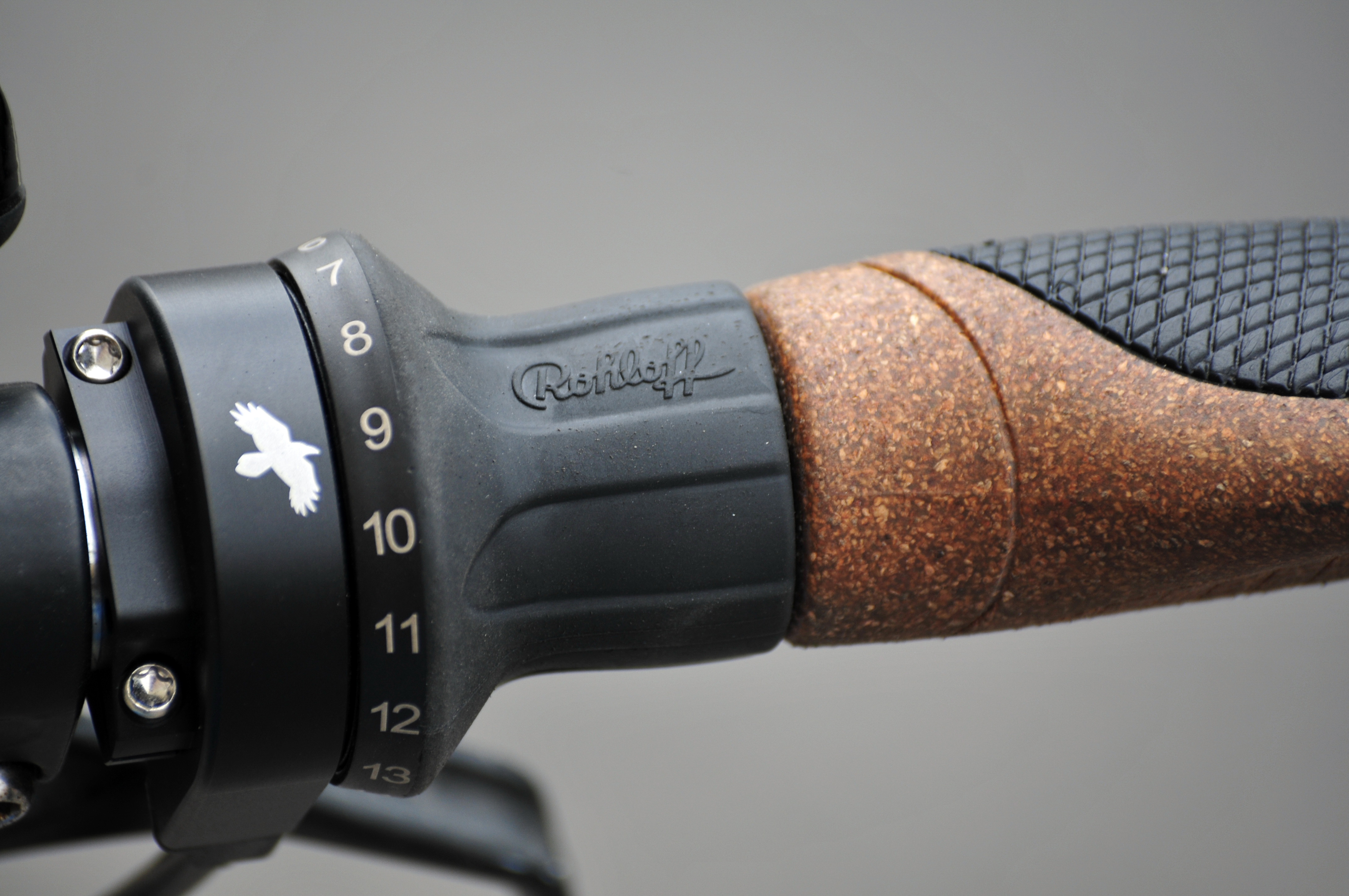 Reiserad Alu